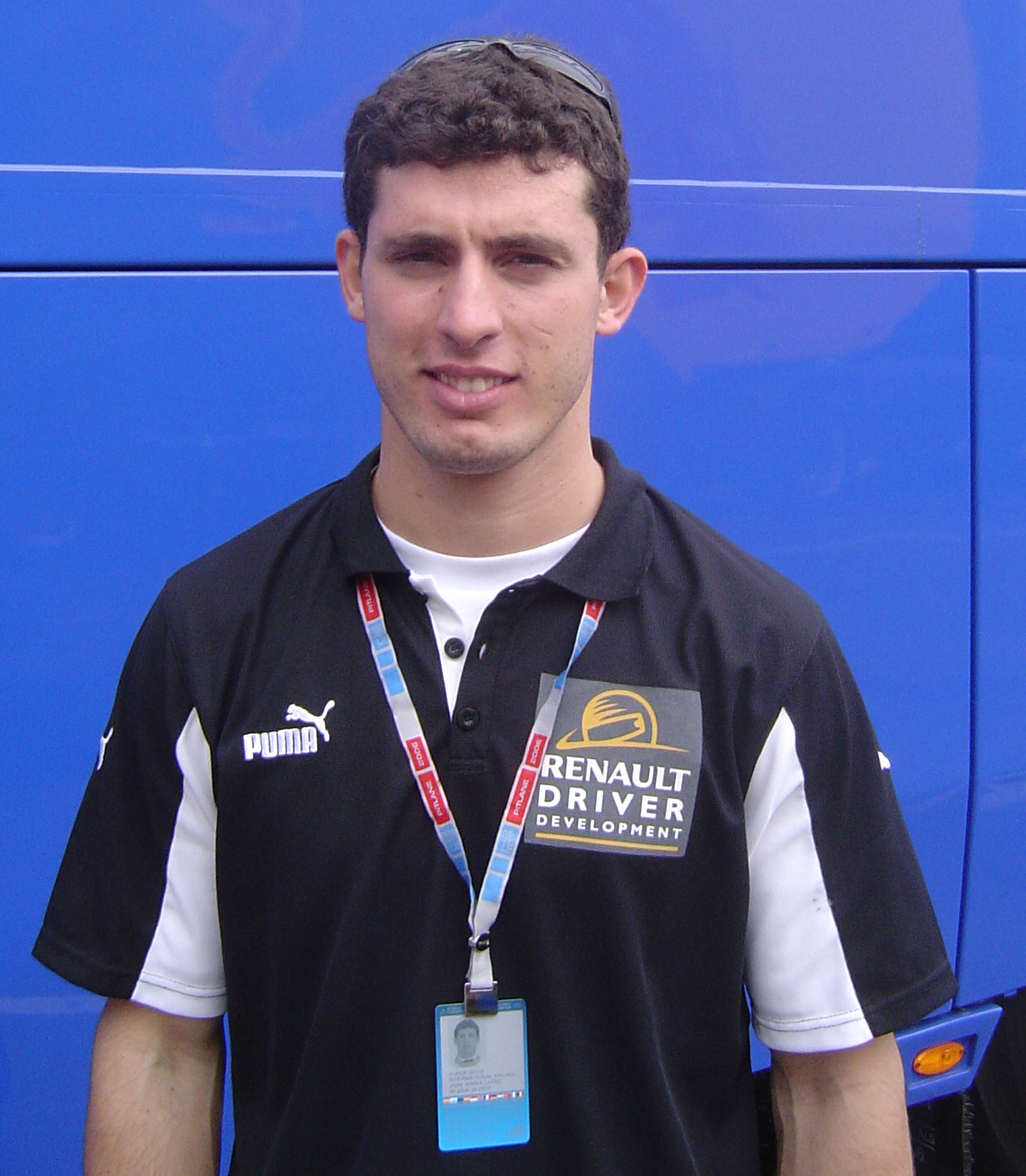 José María "Pechito" López